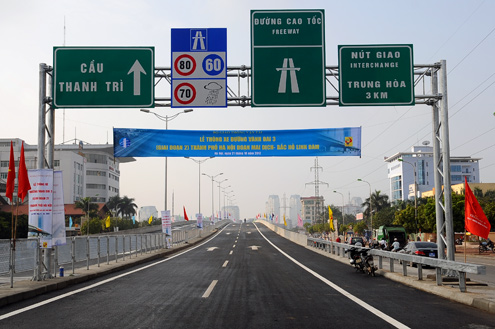 Đường vành đai 3 Hà Nội (ký hiệu toàn tuyến: CT.20)